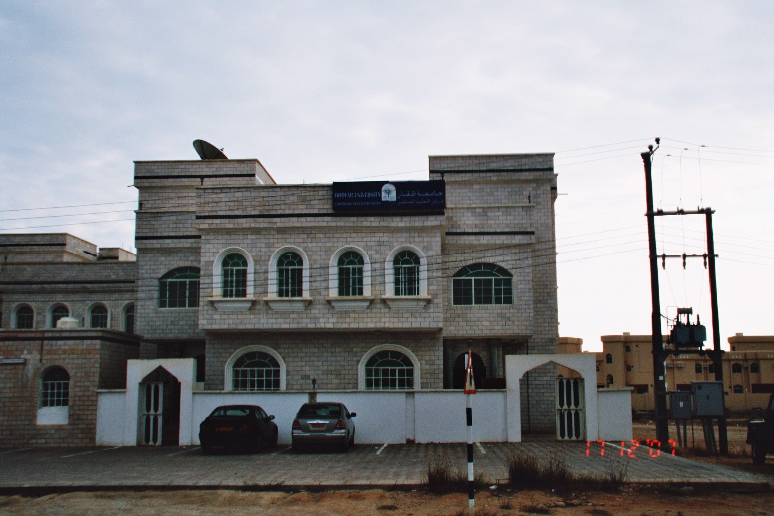 Dhofar Universität - Nebengebäude